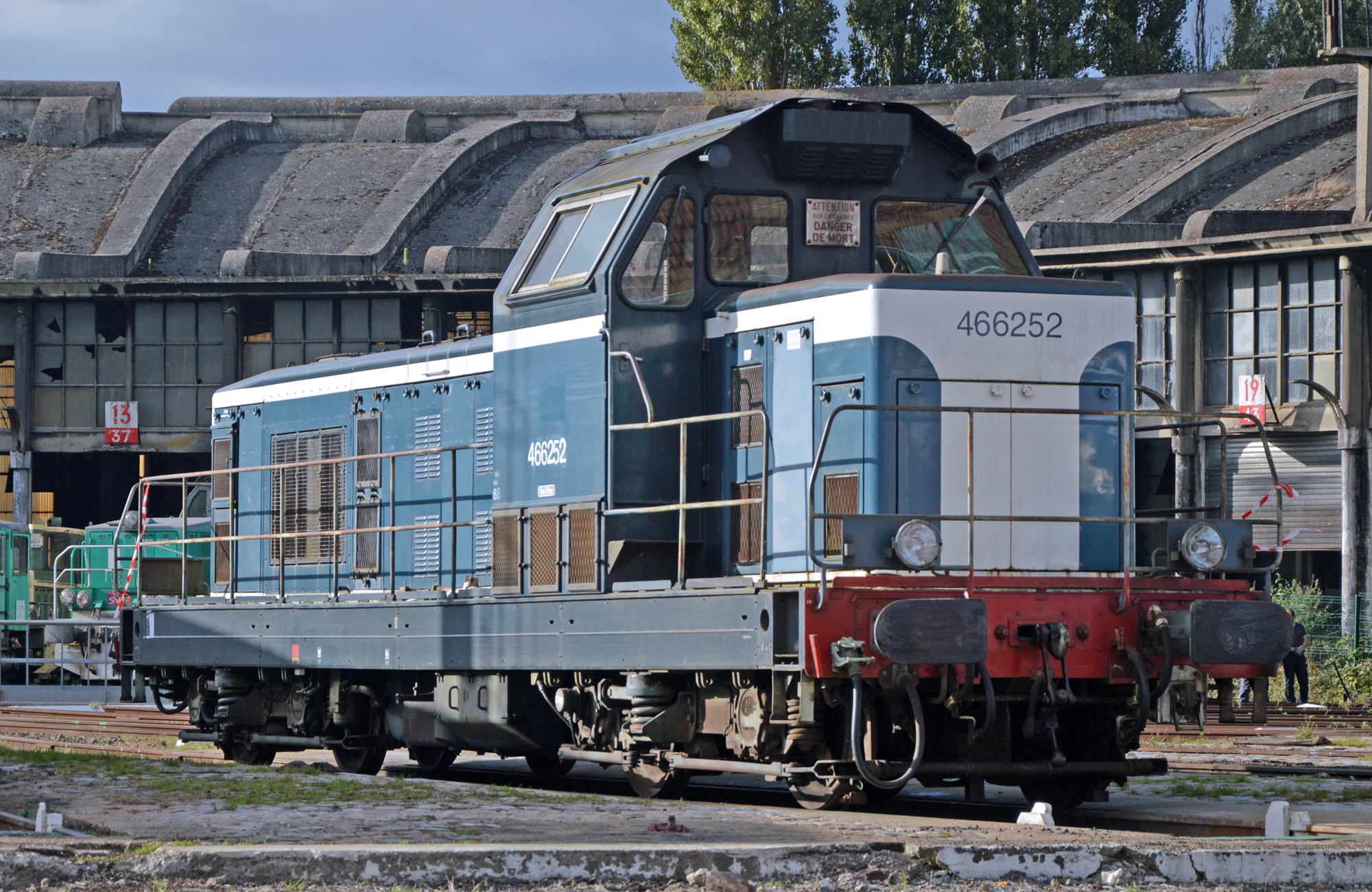 BB 66252 du CFT Vermandois sur la rotonde de Longueau